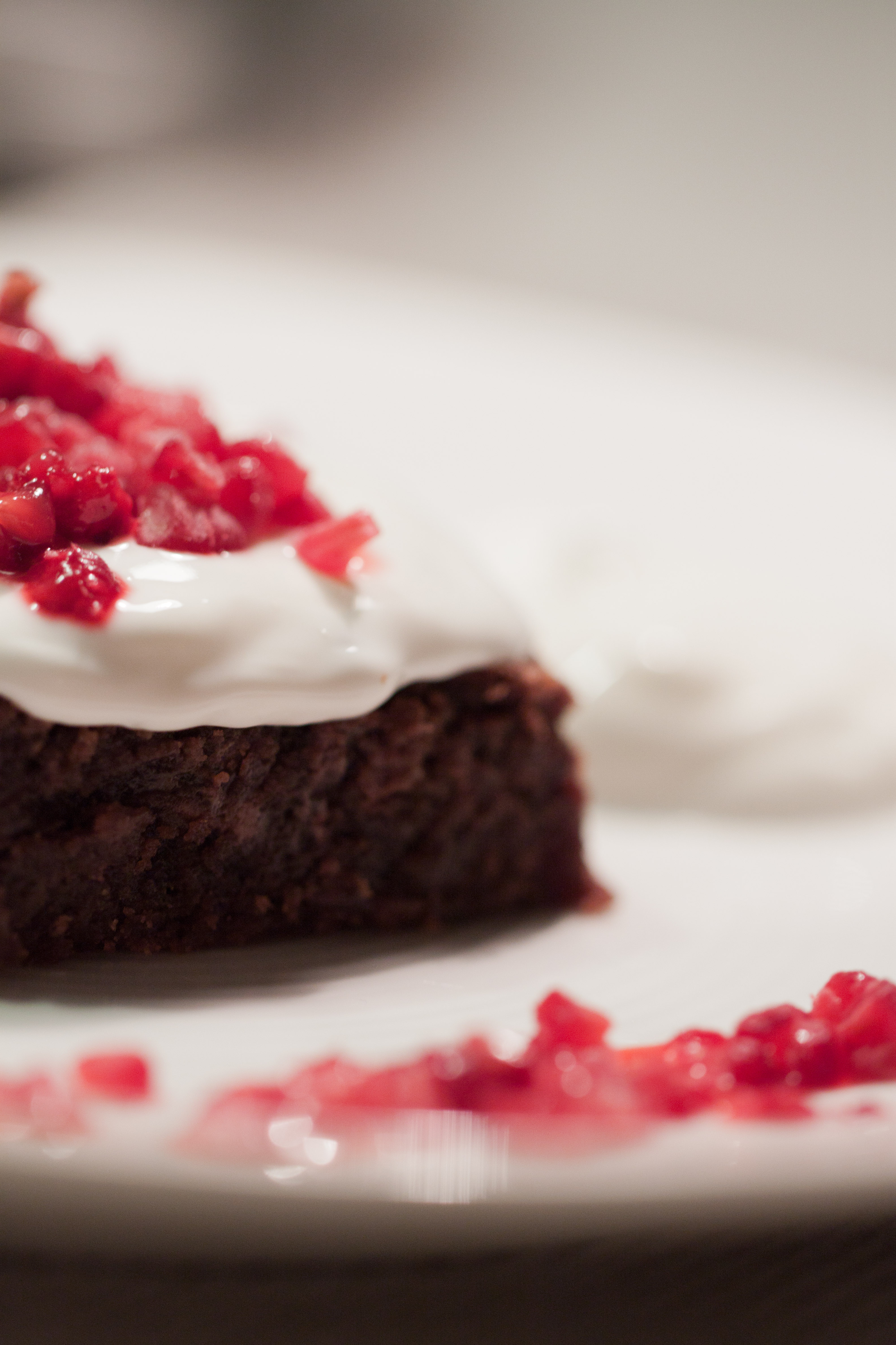 Så här kan det se ut när brownies används i en efterrätt.